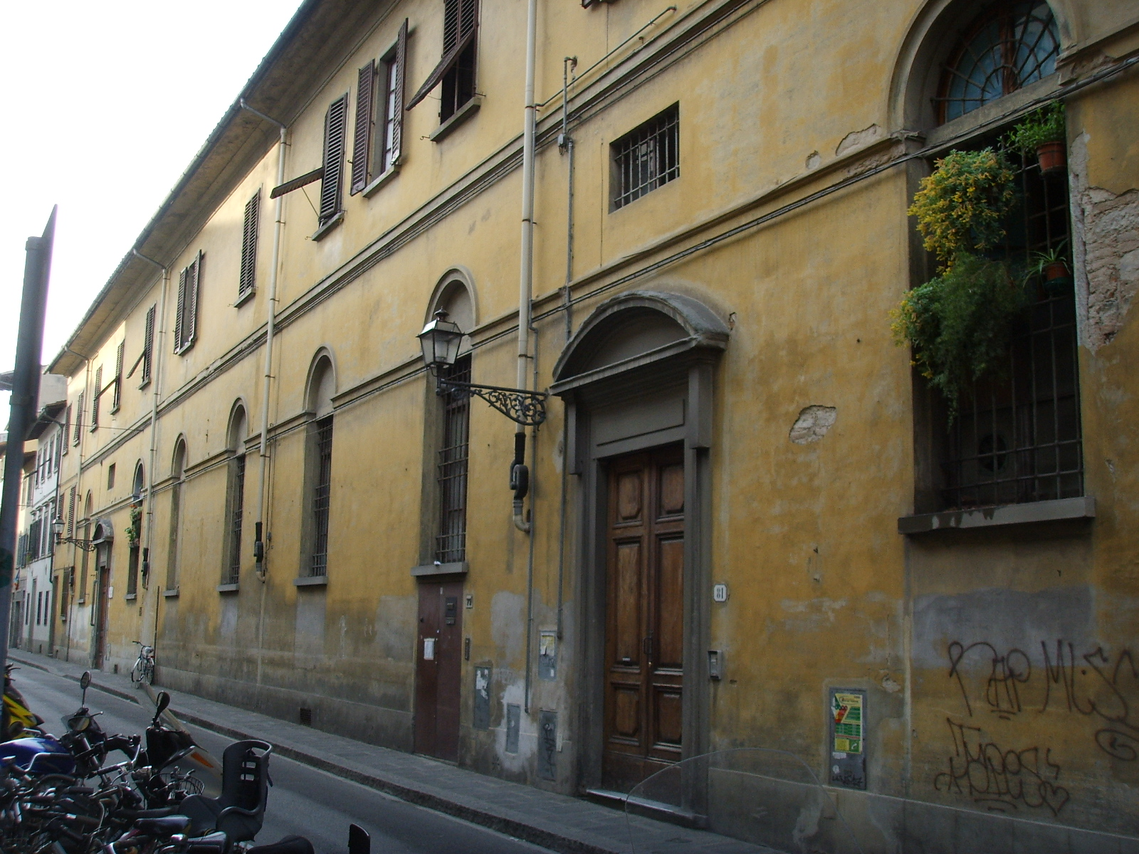 Istituto_Sant'Agnese, via guelfa, florence italy